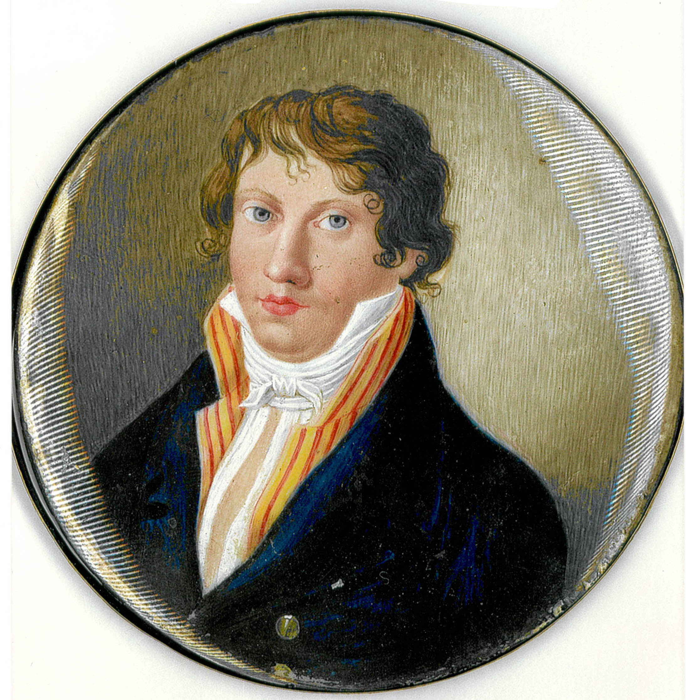 Ritratto di Carlo Rocco, risalente probabilmente alla fine degli anno trenta dell'Ottocento